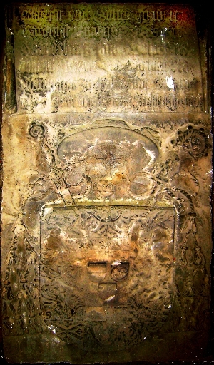 Wappenstein Albrechts IV. am ehemaligen Schlossportal